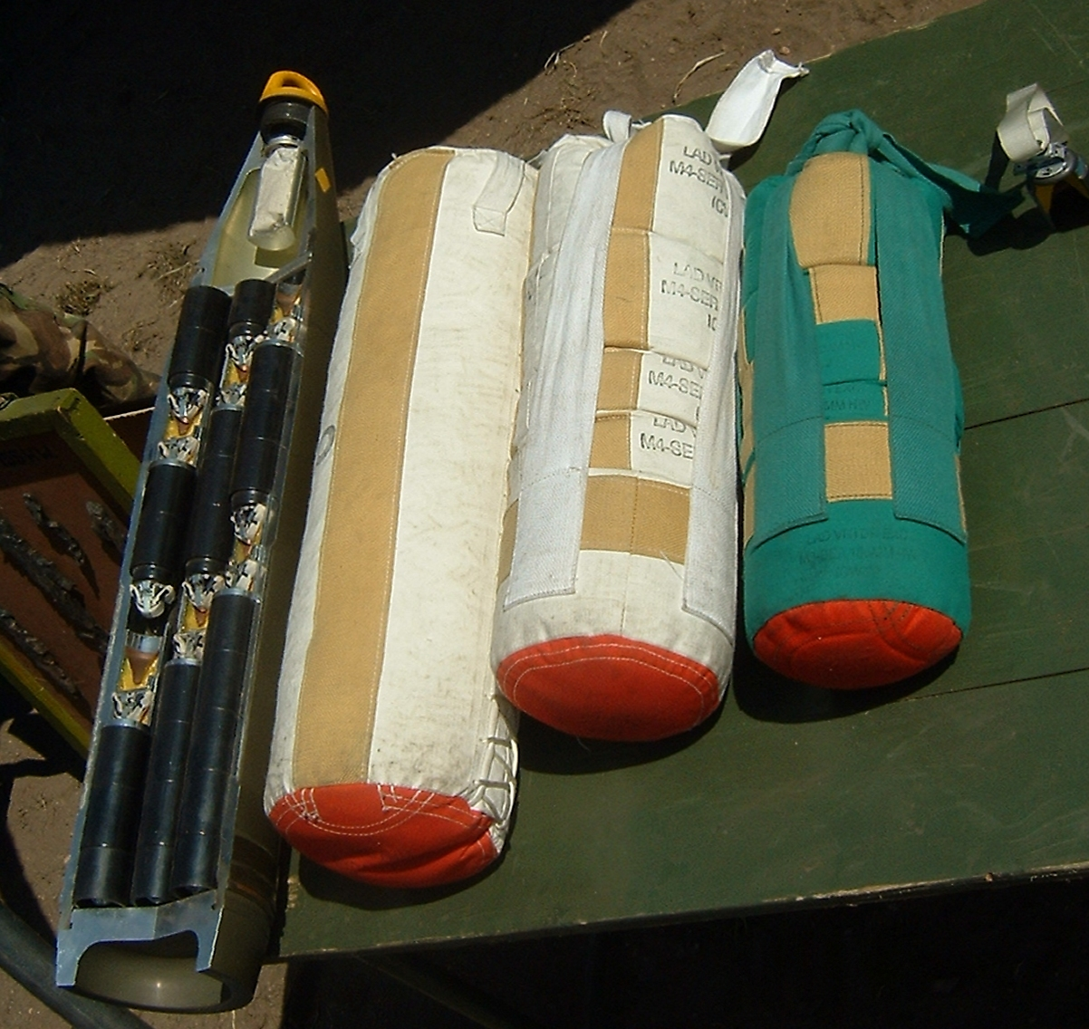 In lengterichting doorgezaagde granaat met clusterbommen (links). Rechts in de hoek een enkele lading. Foto gemaakt tijdens Landmachtdagen 2005